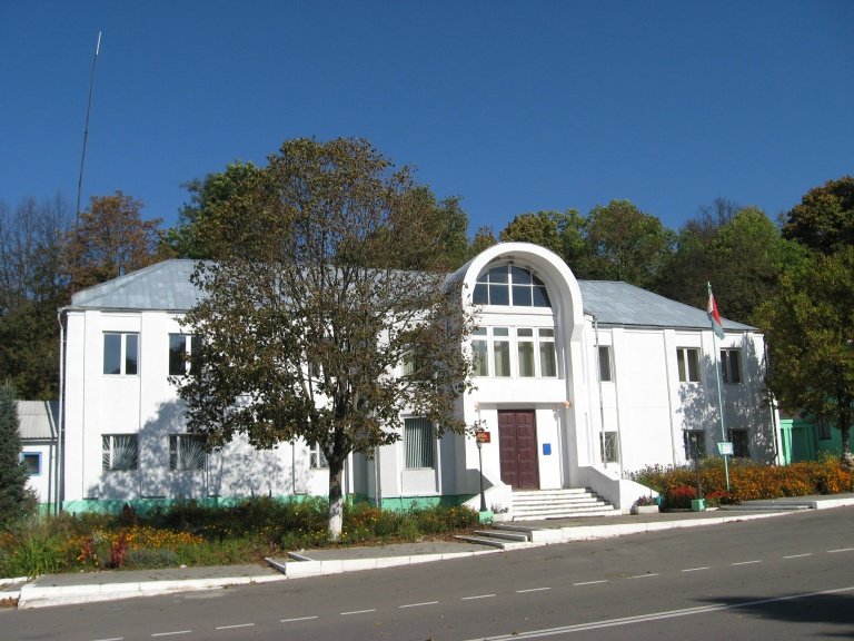 Вольна. Адміністрацыйны будынак